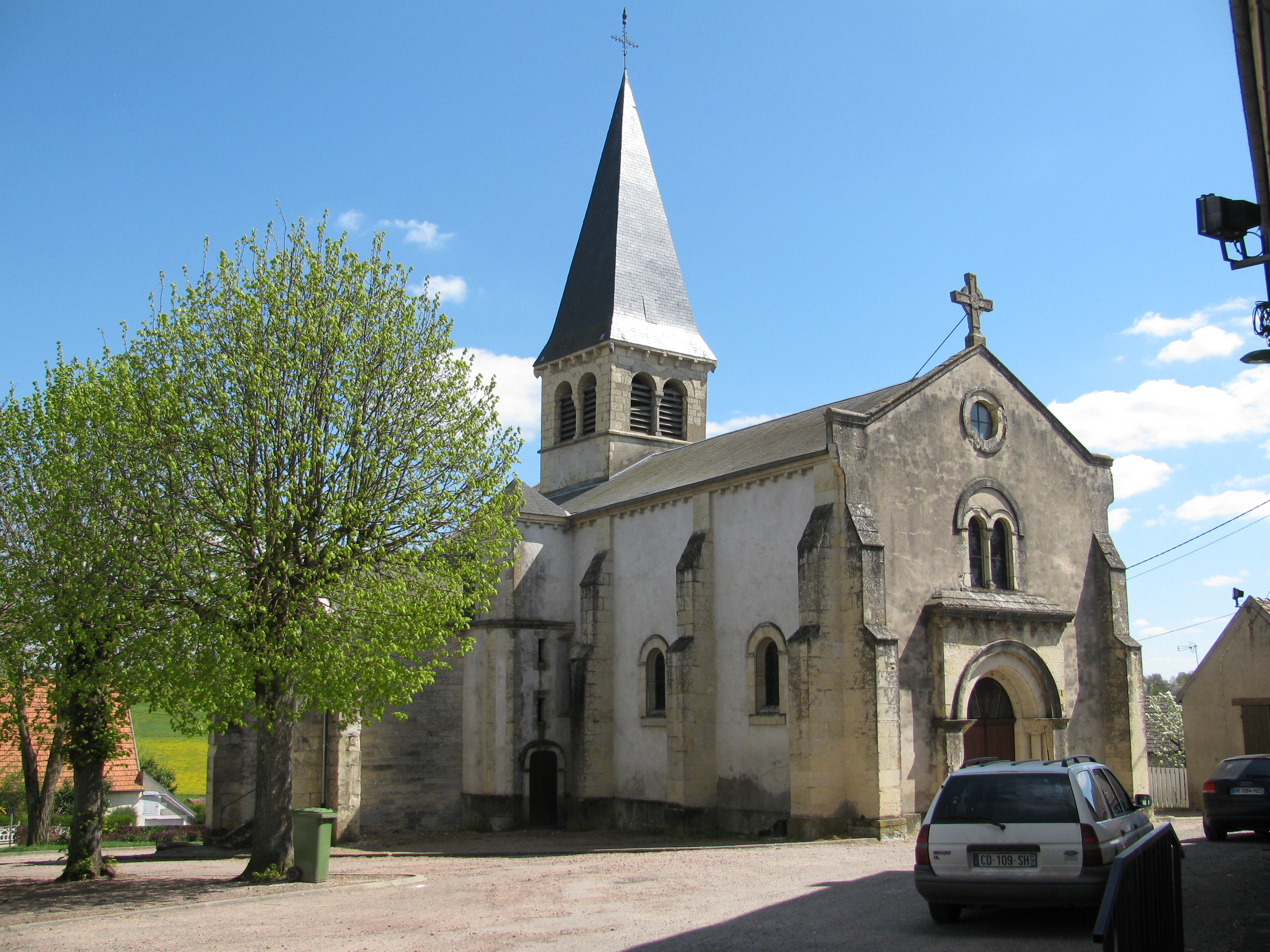 Église Saint-Aignan de Luthenay-Uxeloup, Nièvre, France